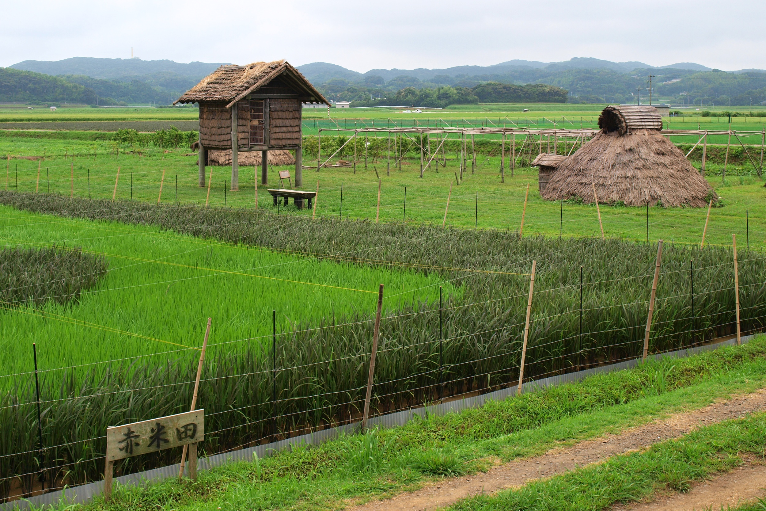 長崎県壱岐市 原の辻遺跡 赤米田